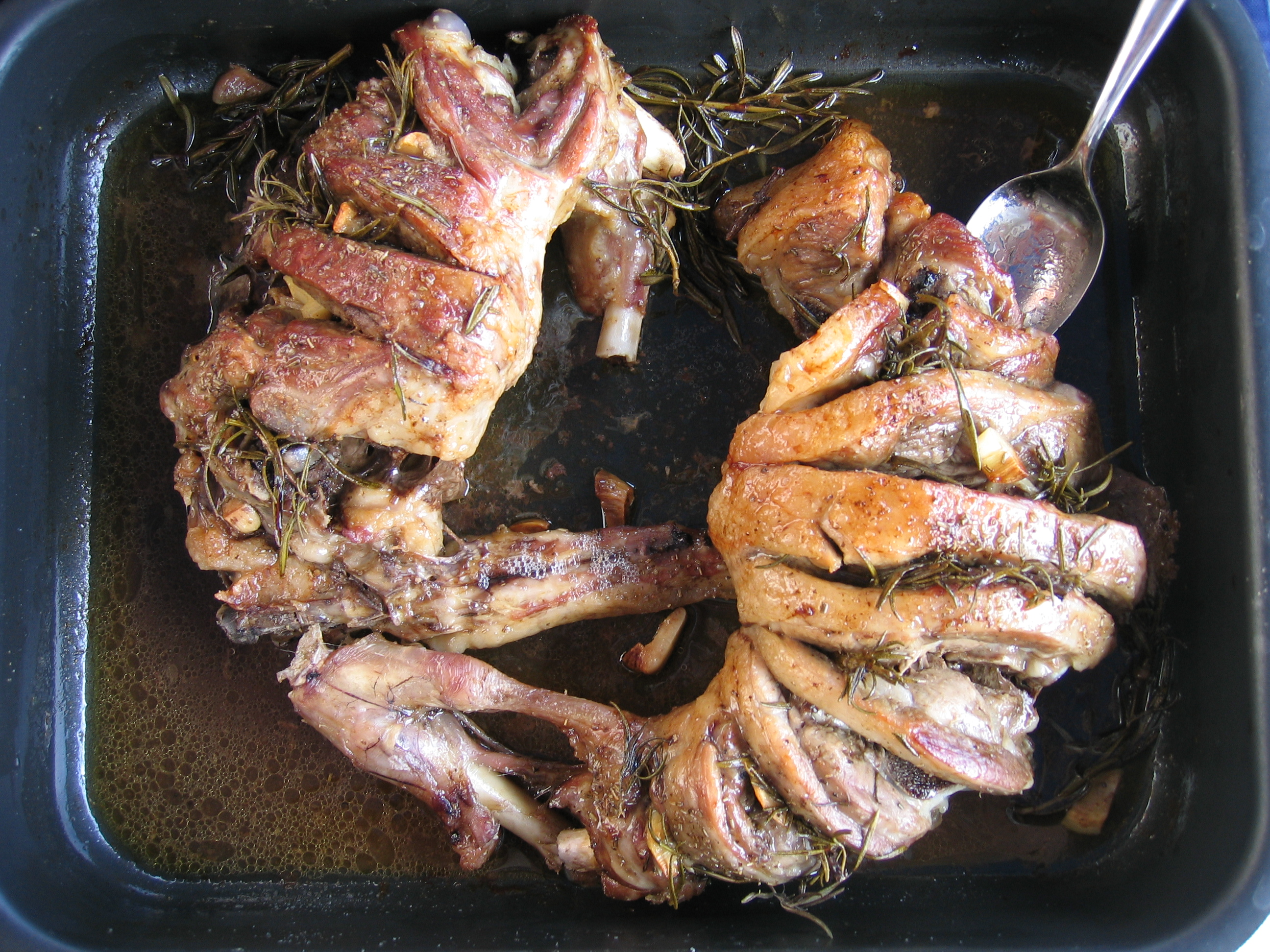 Abbacchio Pasquale ... al forno, aglio, olio e rosmarino ...